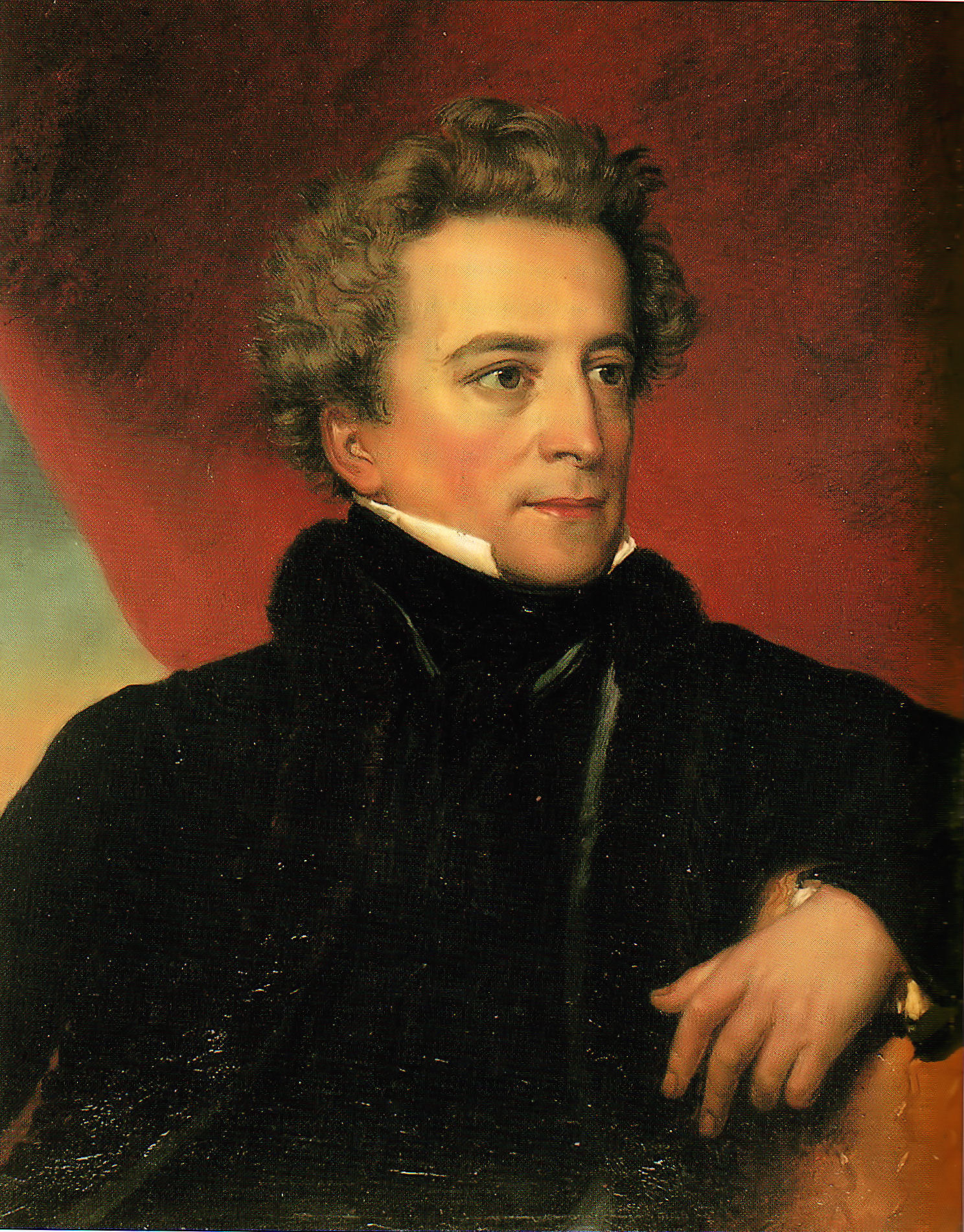 Dessewffy József, a Magyar Tudományos Akadémia igazgatósági és tiszteletbeli tagja portréja